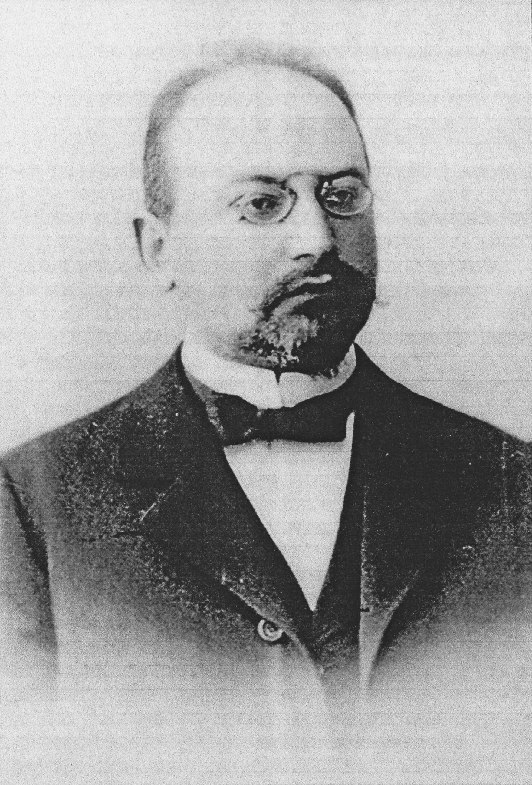 Portrait des Geologen Prof. Ludwig Milch